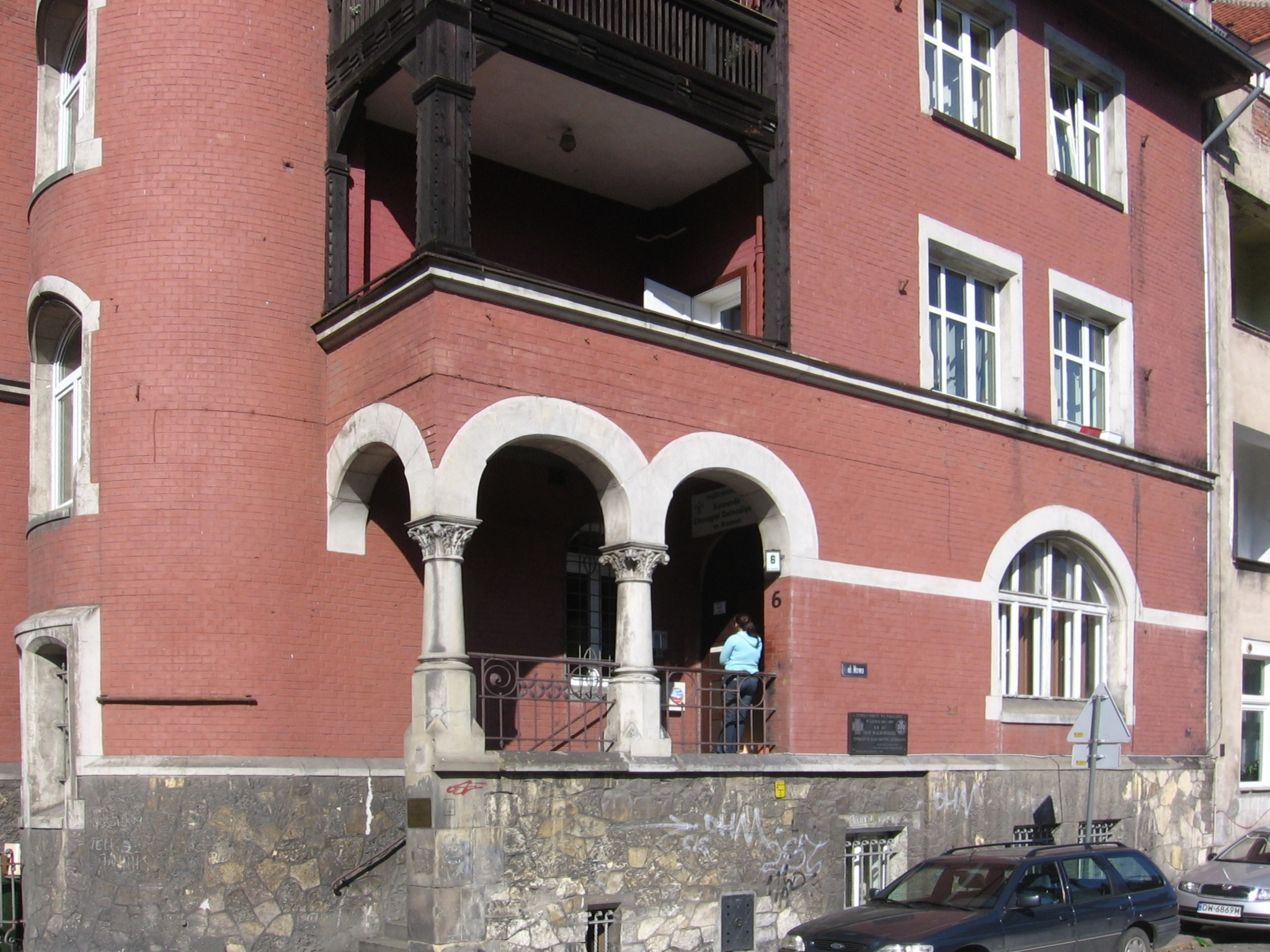 siedziba